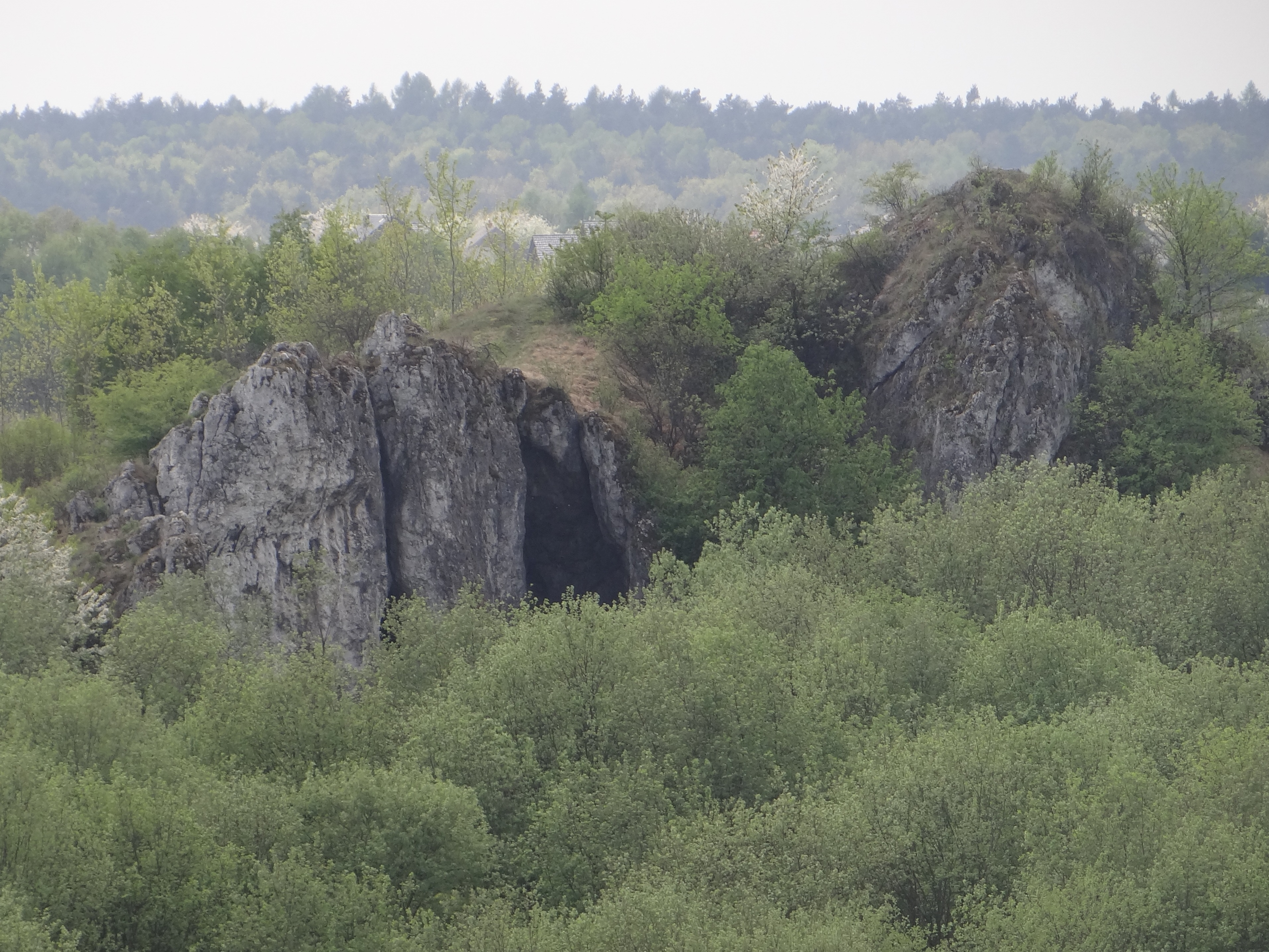 Skała Żytnia w miejscowości Bębło. Widok od strony północnej